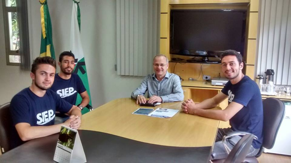 Reunião da SIEP com o reitor da Universidade Estadual de Maringá.